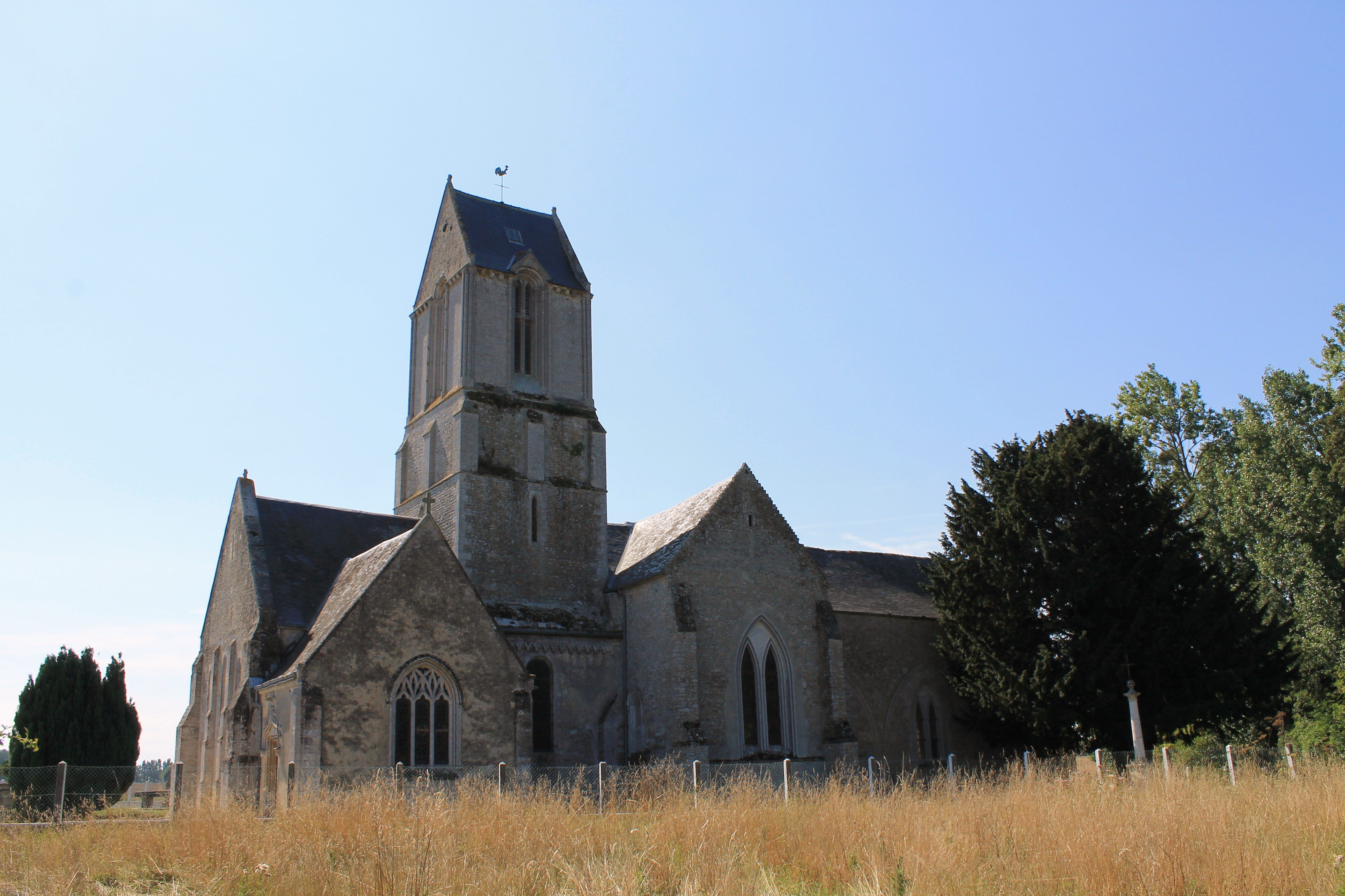 Église Saint-Malo de Magny-en-Bessin (Calvados)